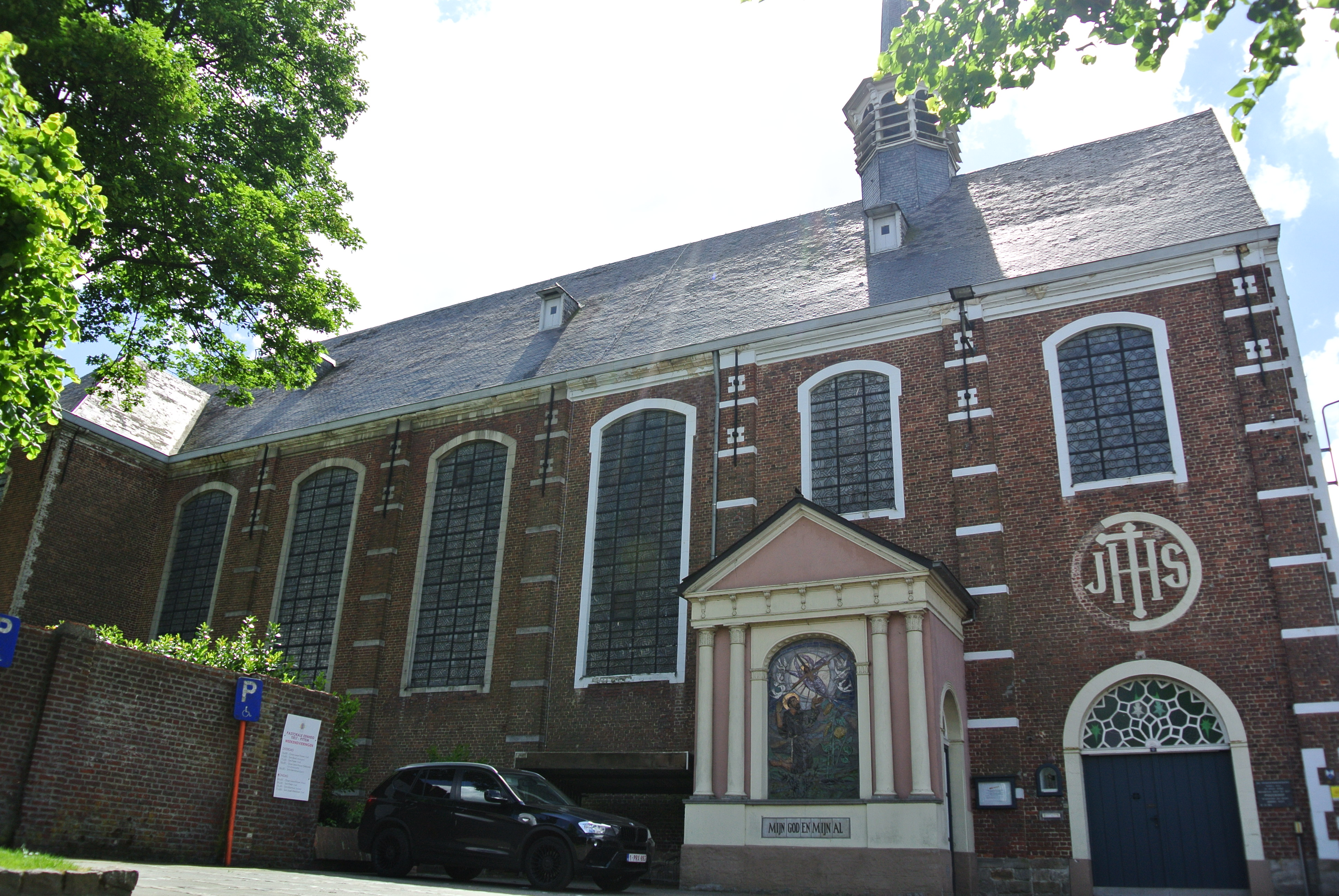 Voormalig Minderbroedersklooster - Patersdreef Tielt